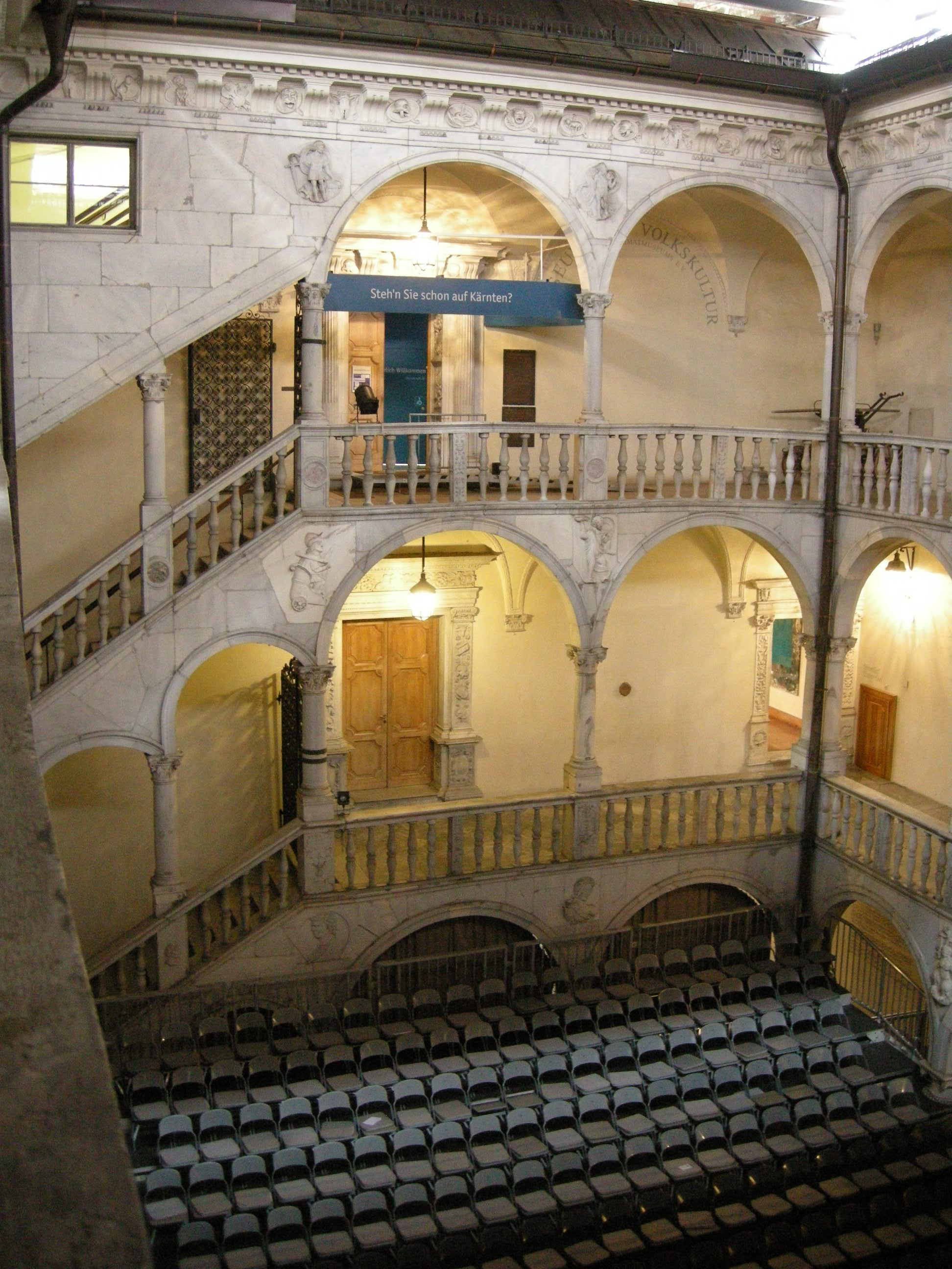 Spittal an der drau, schloss porcia, cortile